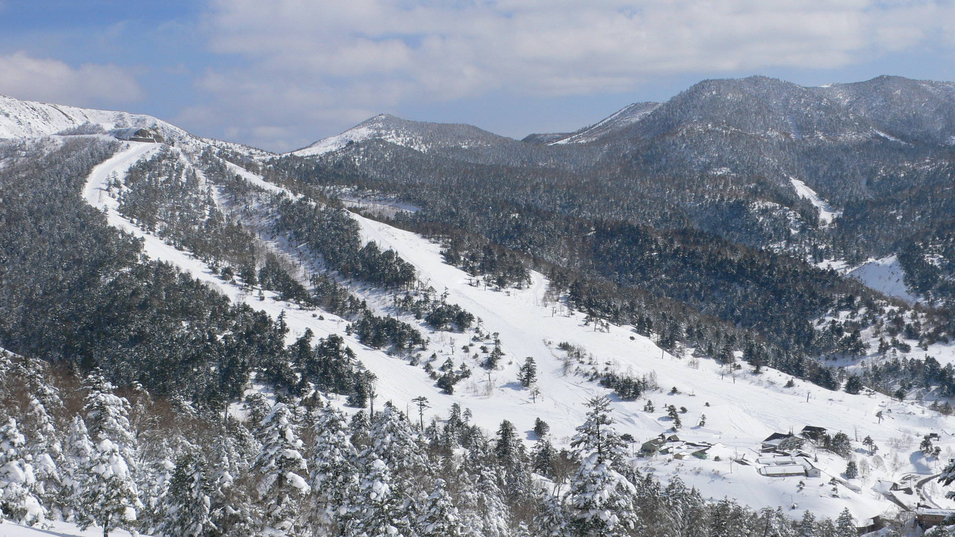 Manza_Ski_Resort (Mt.Asahi) (万座温泉スキー場)